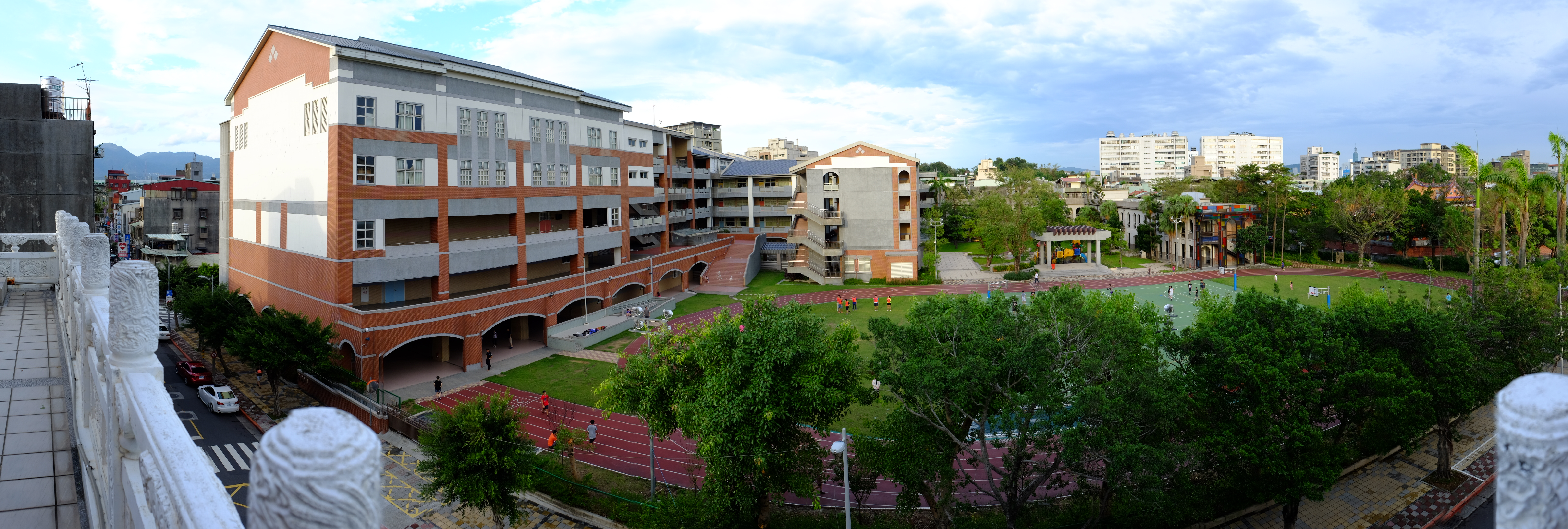 臺北市大同區大龍國民小學操場。